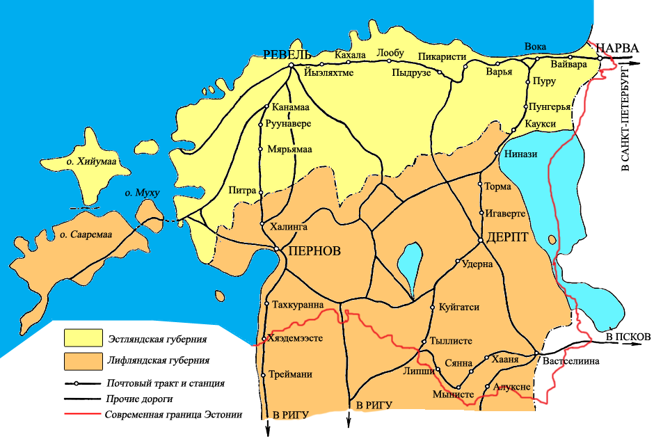 Карта сети почтовых станций на территории современной Эстонии в 1712-1730 годах